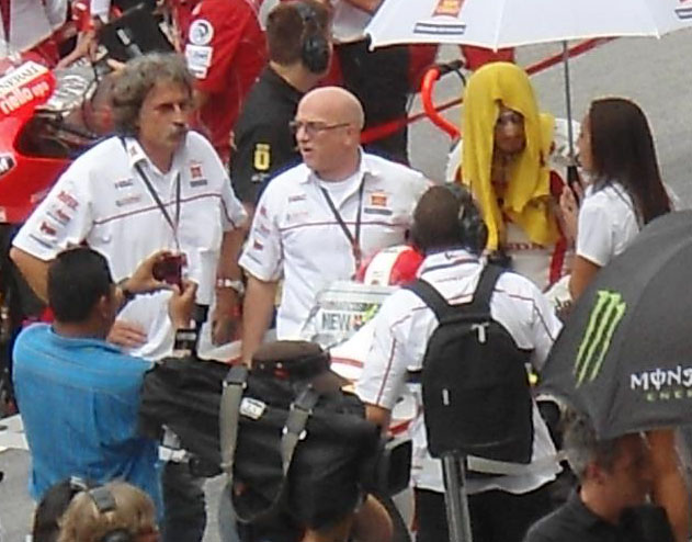 Persiapan di grid jelang MotoGP Malaysia 2011... tragisnya menjadi balapan terakhir untuk Marco Simoncelli.